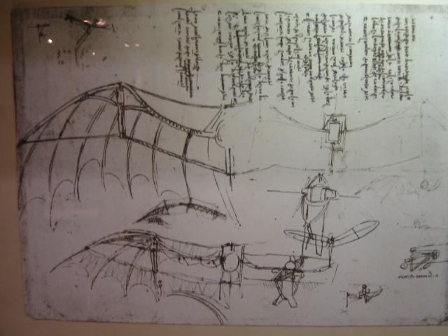 Dessin de Léonard de Vinci - Galerie Léonard de Vinci - Musée des sciences & technologies Léonard de Vinci de Milan - Italie